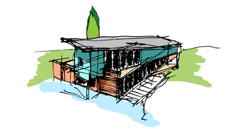 zelf gemaakt Eén van mijn ontwerpschetsen. Gebruikt als logo op gebruikerspagina Velvis